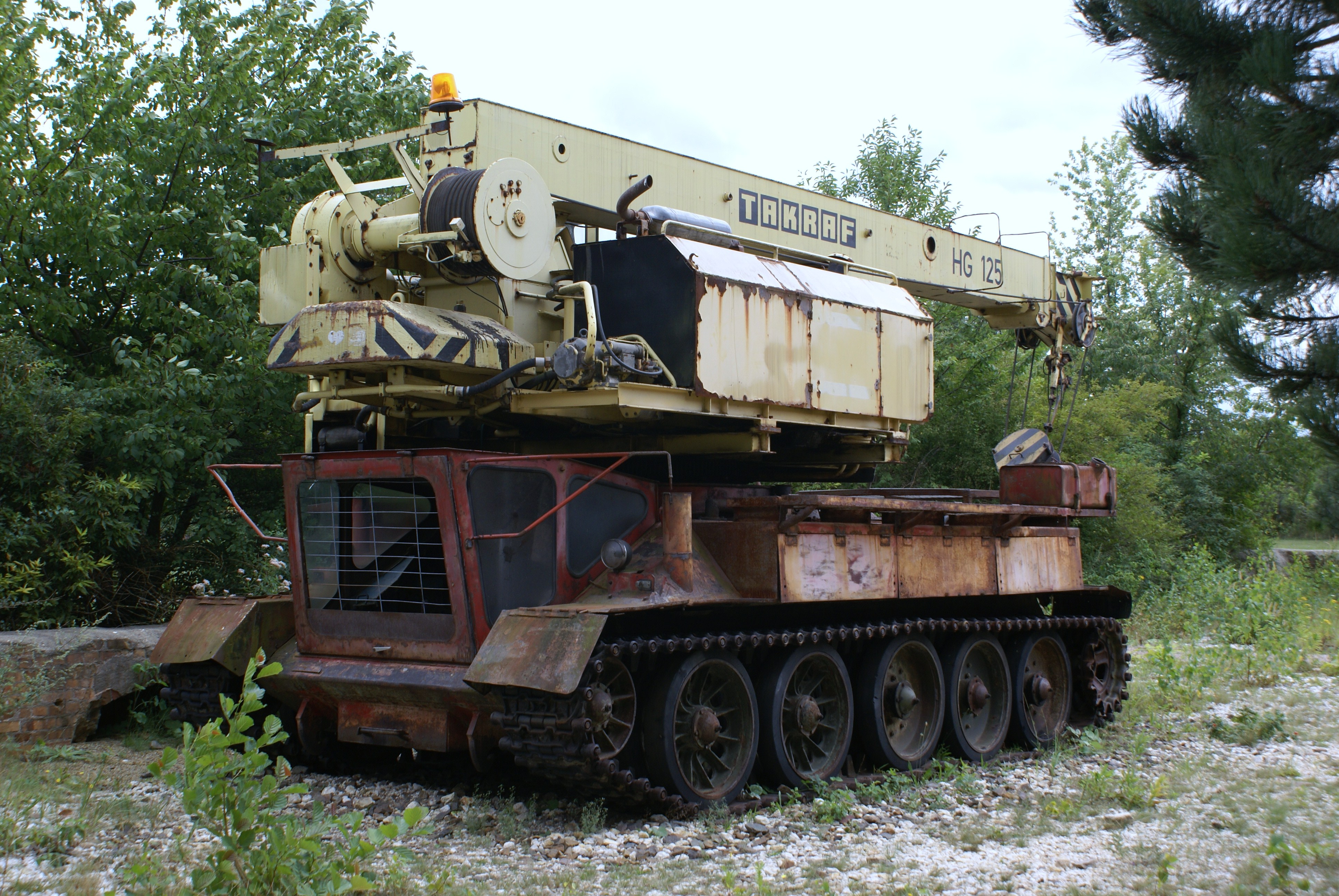 Energiefabrik Knappenrode in Hoyerswerda-Knappenrode